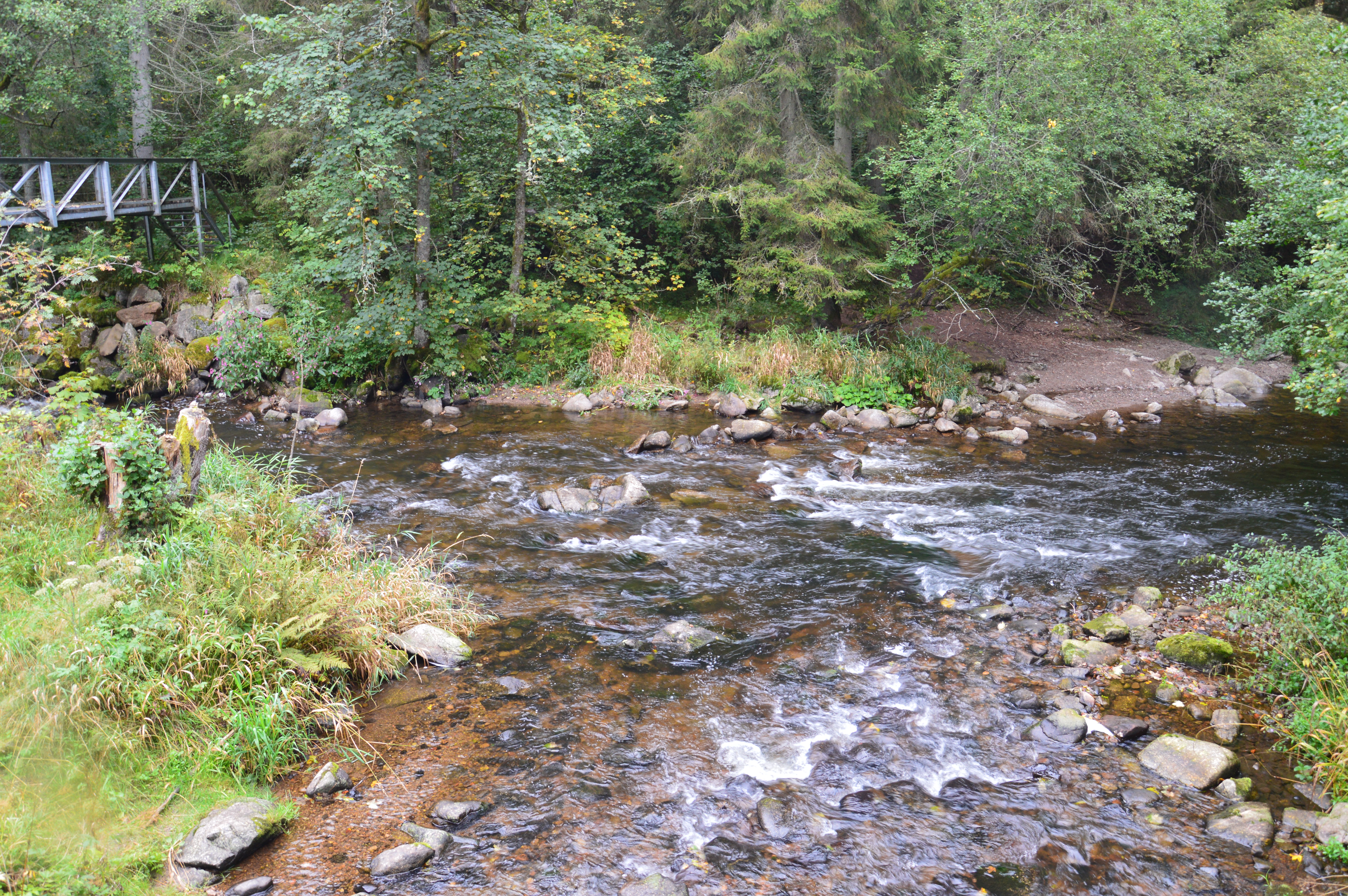 Dè Zämmèfluss vo dè Guètach (links obbè) un dè Haslach (links unnè) zu dè Wuètè (rächts absi).